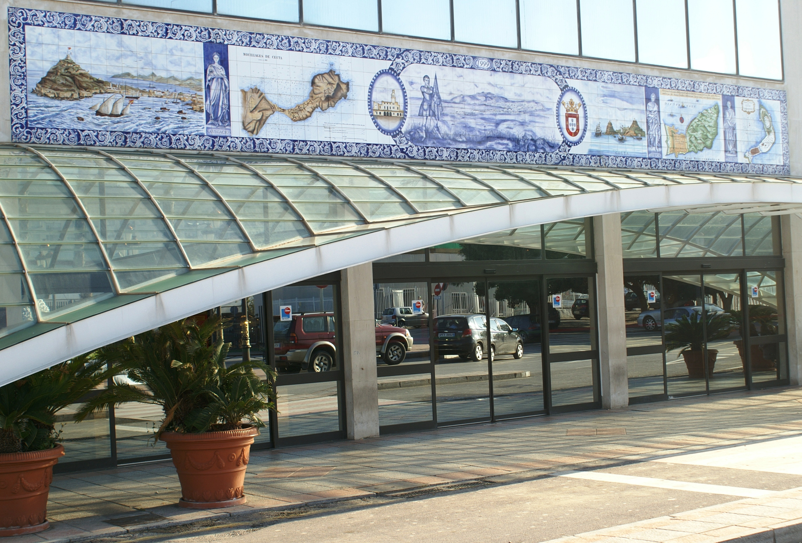 CEUTA © DJE